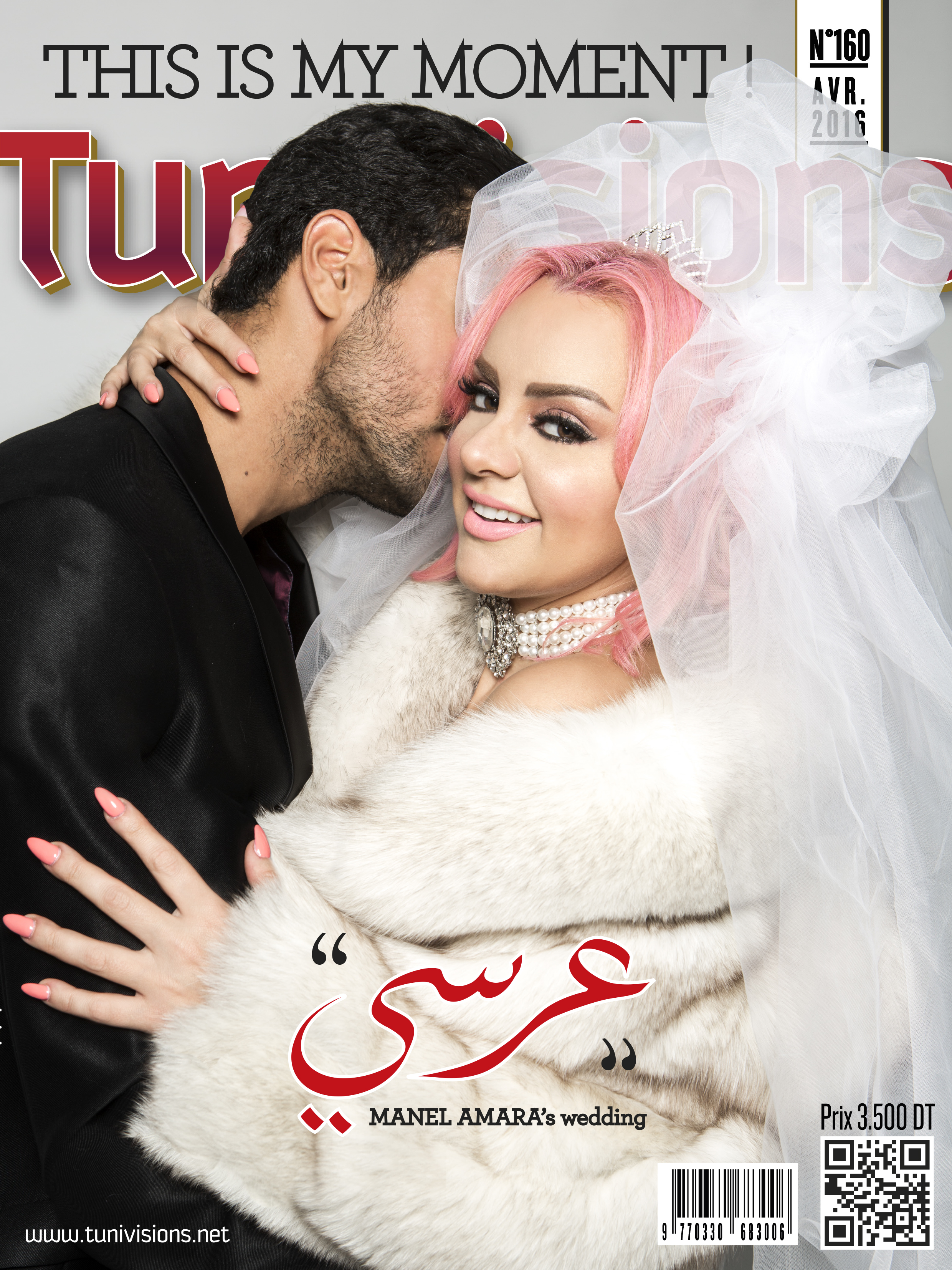 Couverture du numéro 160 du magazine tunisien Tunivisions.